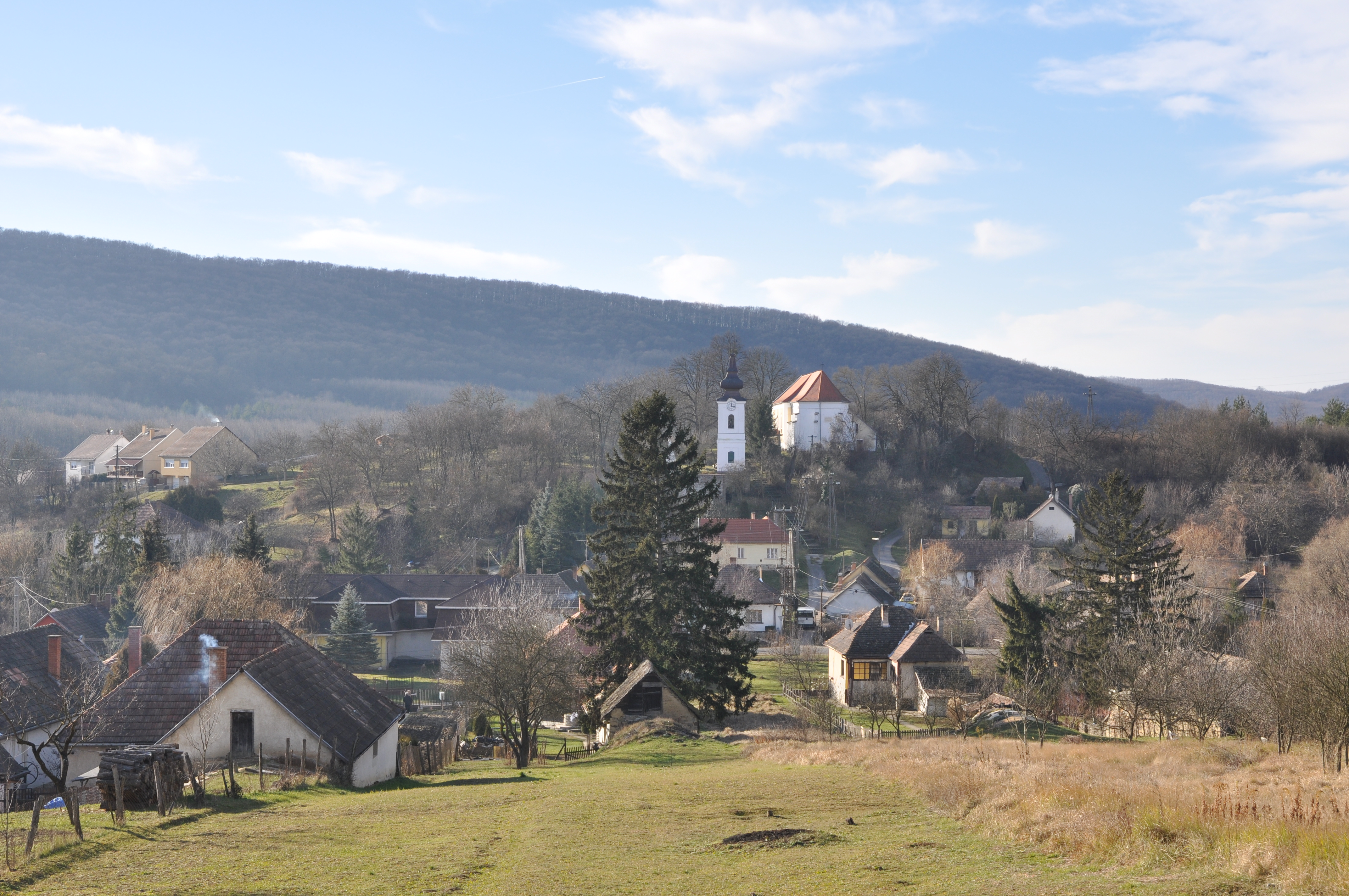 Alsópetény